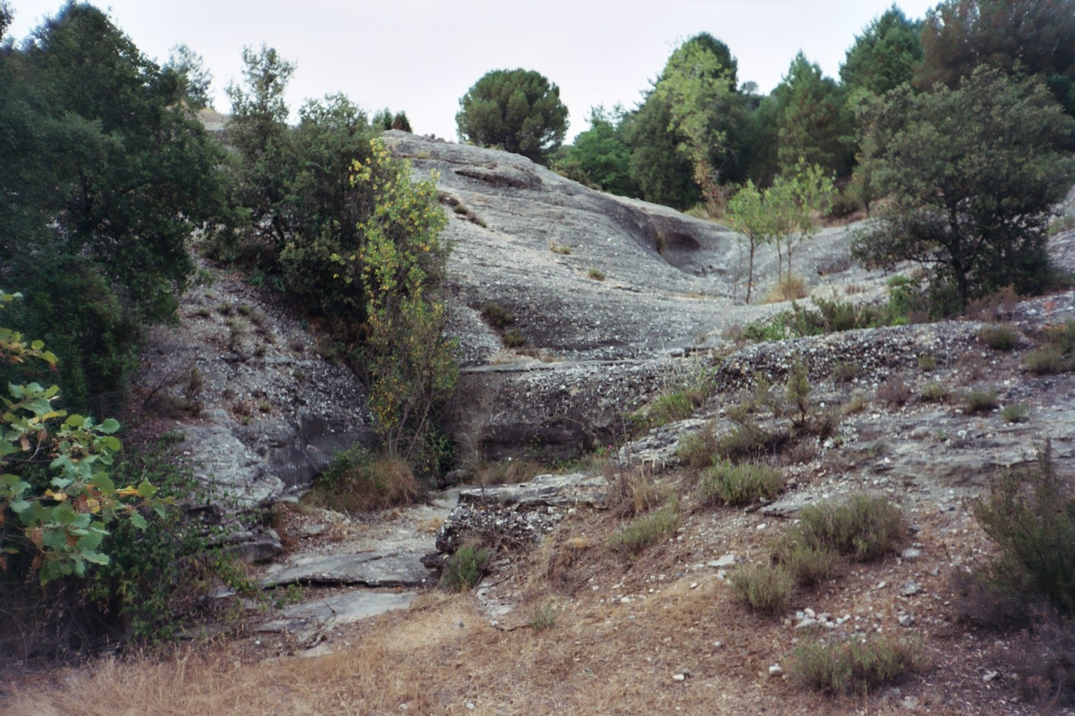 El torrent de Vilaterçana, al Trull (Monistrol de Calders, Moianès)